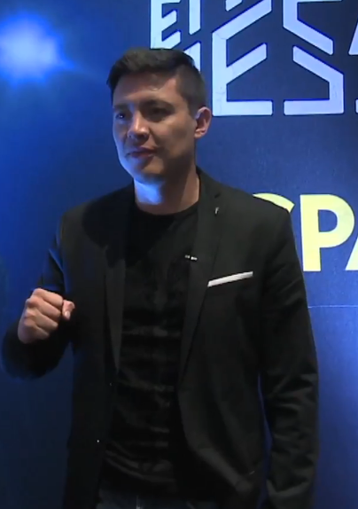 La bioserie del boxeador será protagonizada por el actor Armando Hernández, quien dará vida al "Gran Campeón Mexicano"